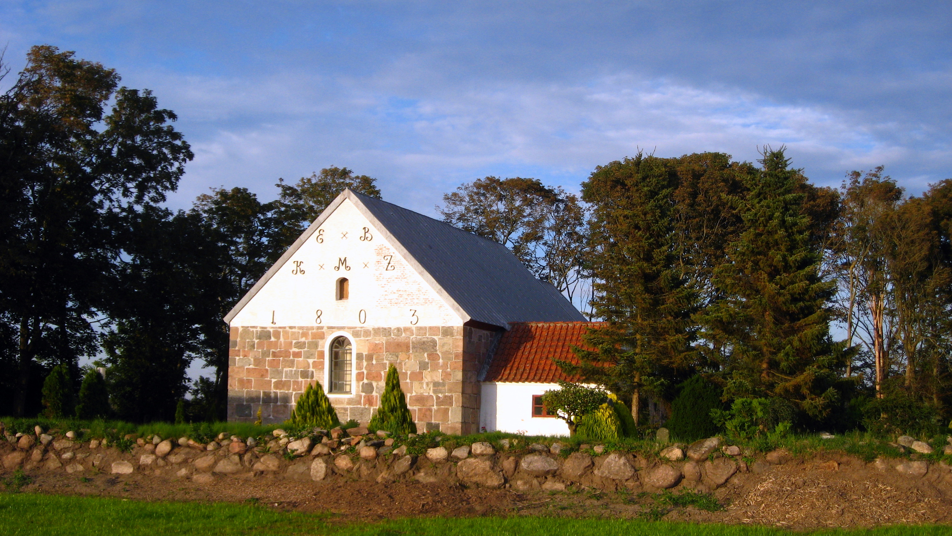 Sønder Harritslev Kirke, Hjørring Kommune